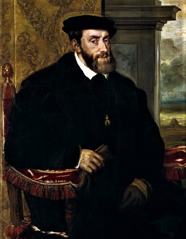 Tiziano - Retrato de Carlos V sentado